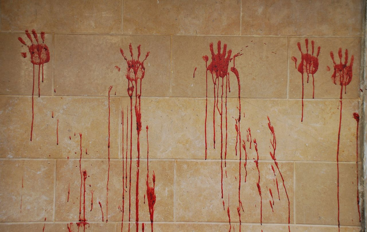 Fatimahand-Abdruck mit Schafsblut am islamischen Opferfest, Kairo, nahe Midan Talat Harb